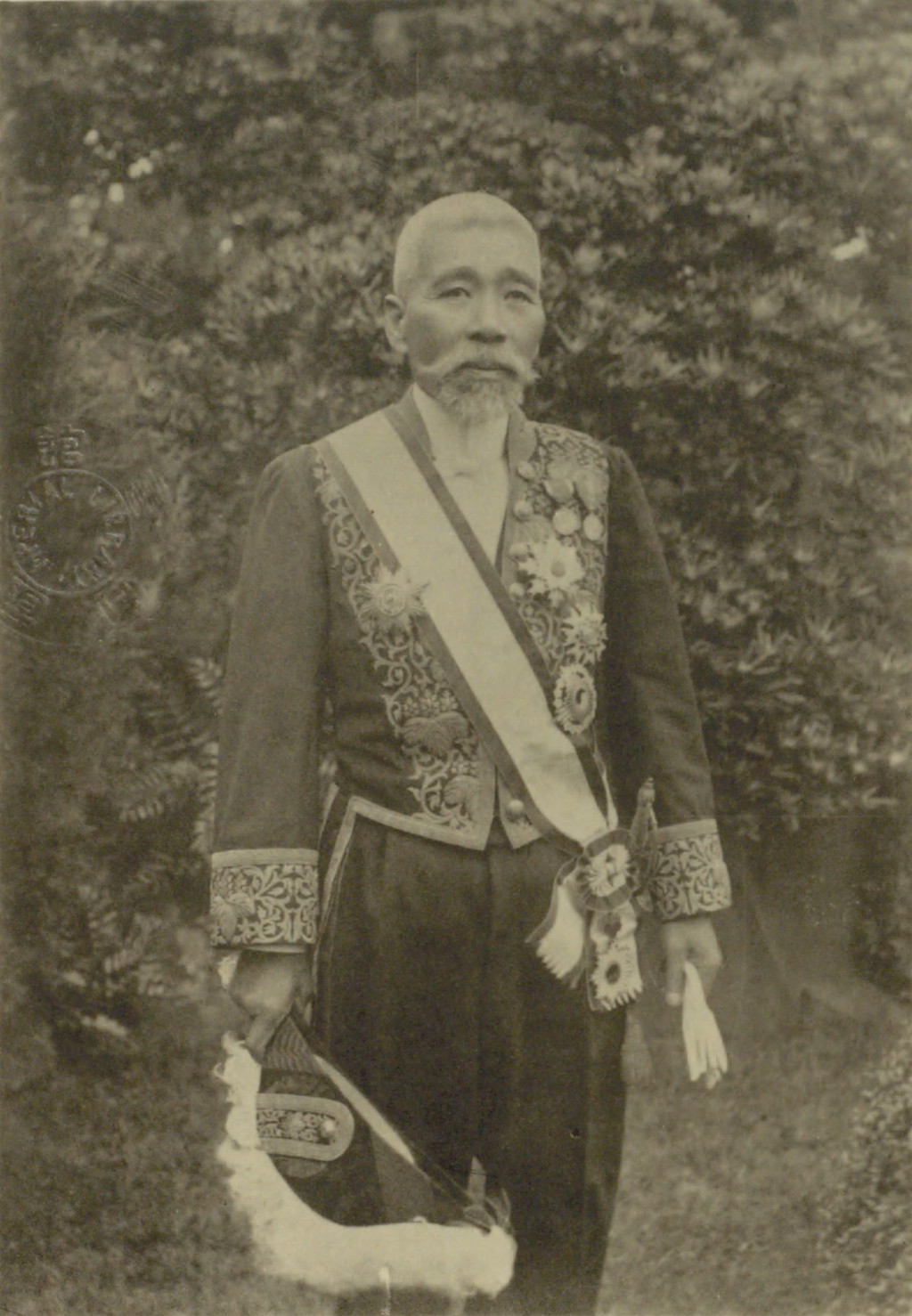 Portrait of Matsuoka Yasutake (松岡康毅, 1846 – 1923)